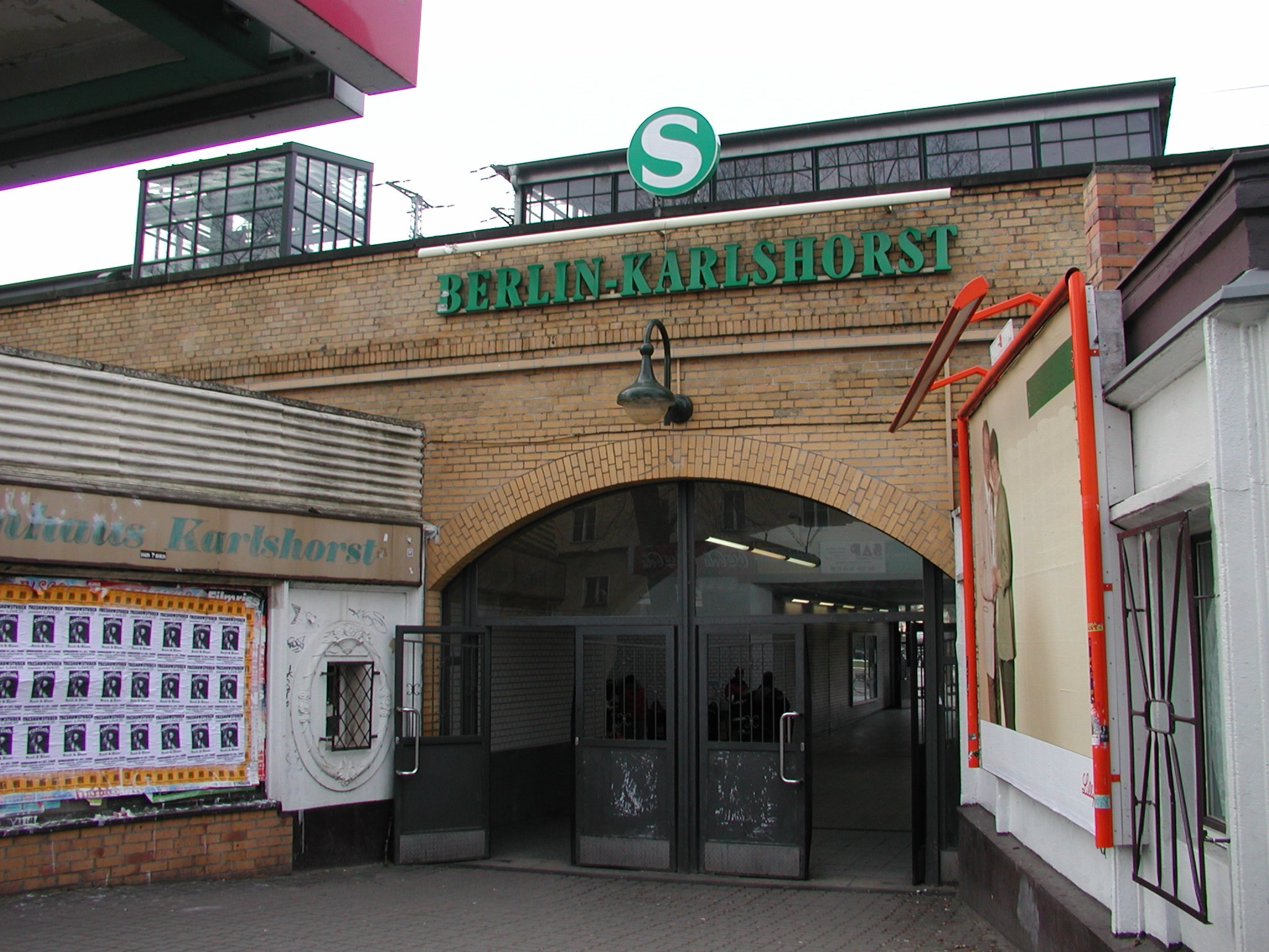 Eingangsbereich Bahnhofsgebäude Karlshorst